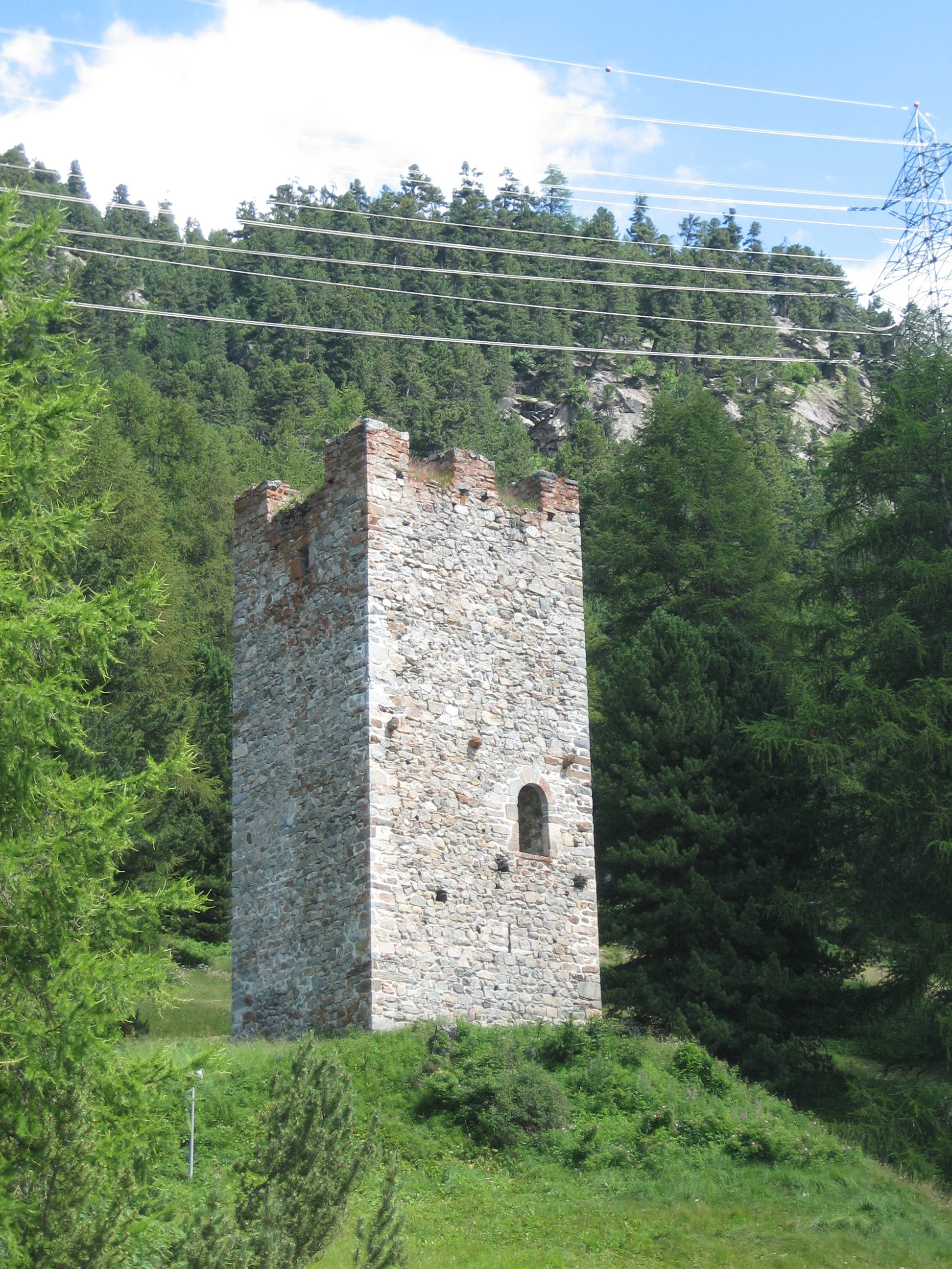 Turm Spaniola, Ansicht von NW